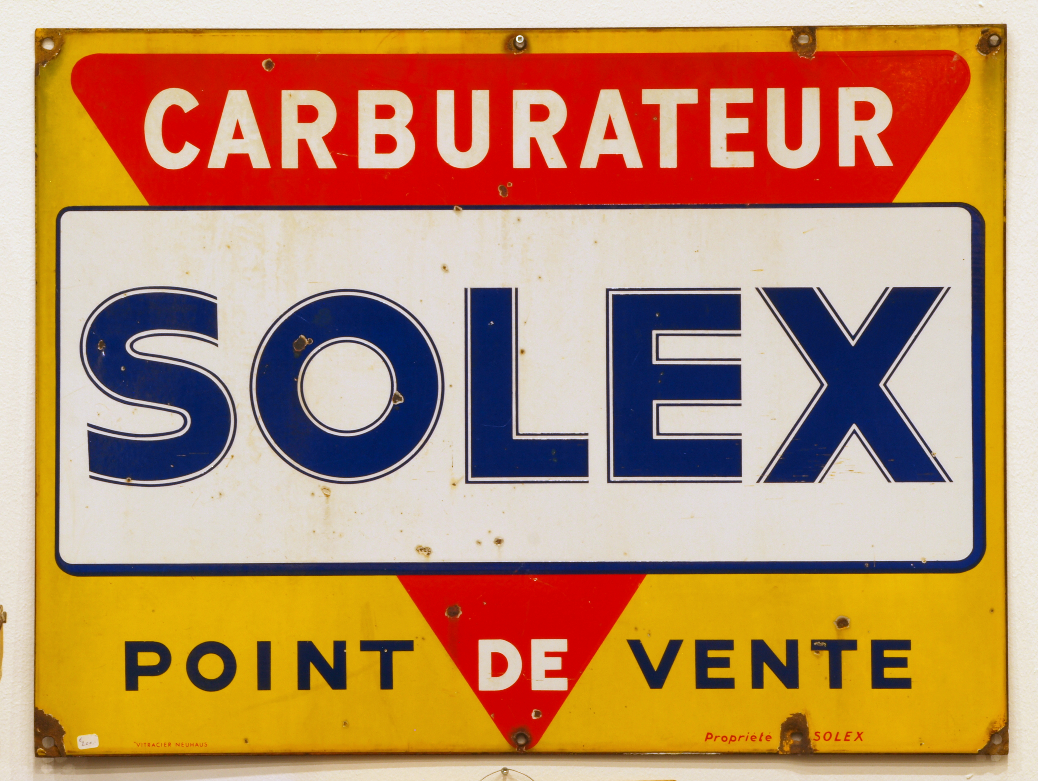 Enamel advertising sign.